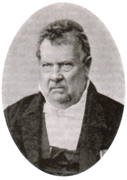 Peter Vogelius Deinboll 1783-1874(1783-1874) Entomologist born in Denmark, but lived and work in Norway. Peter Vogelius Deinboll